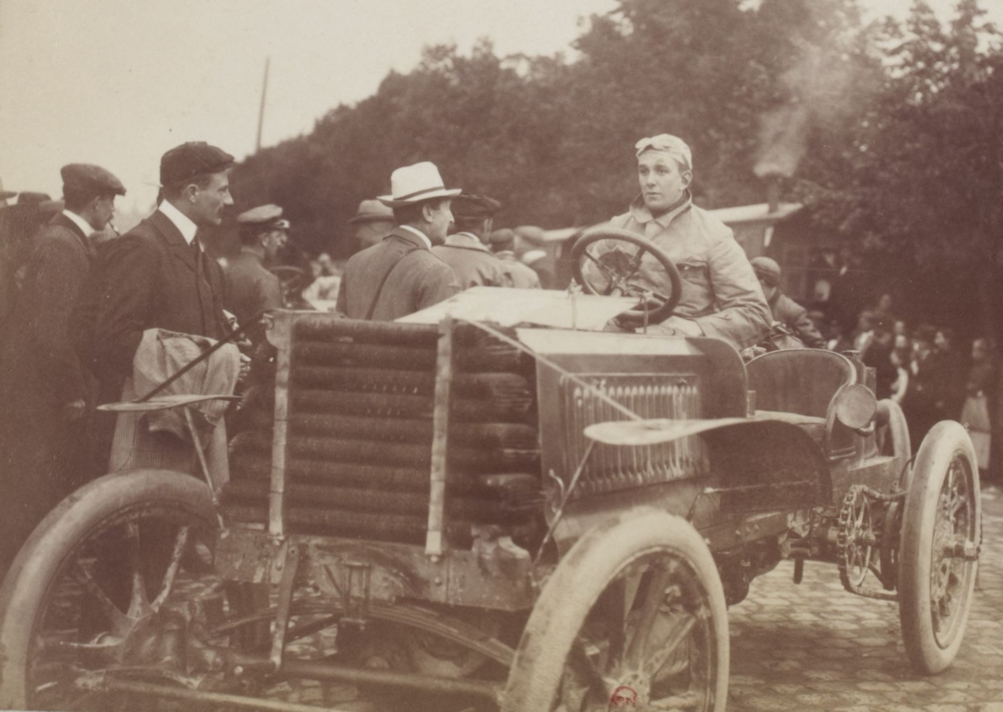 [Collection Jules Beau. Photographie sportive] : T. 19. Année 1902 / Jules Beau : F. 1. Circuit des Ardennes, 31 juillet 1902